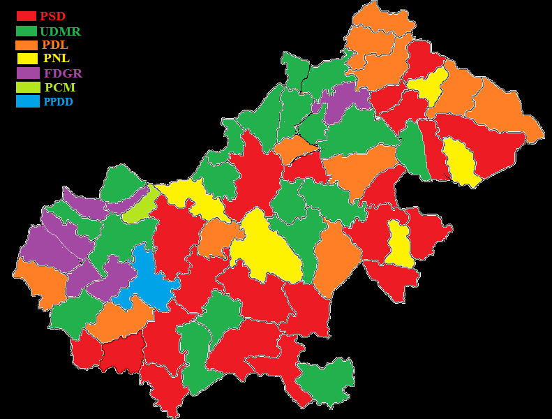 Harta Politica Satu Mare